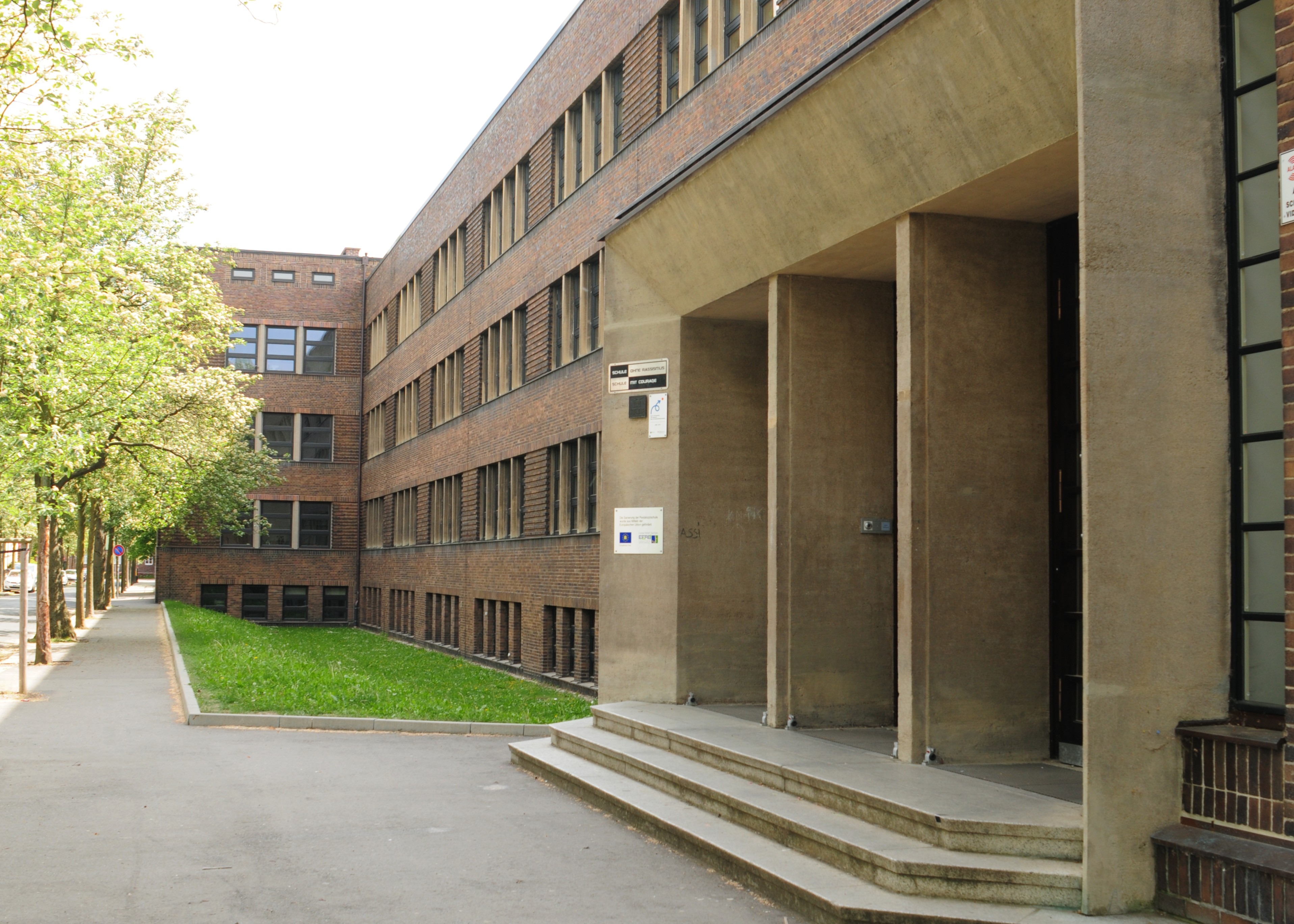 Pestalozzi-Oberschule in Zwickau, Hauptfront mit Maupteingang (Sachsen, Deutschland)